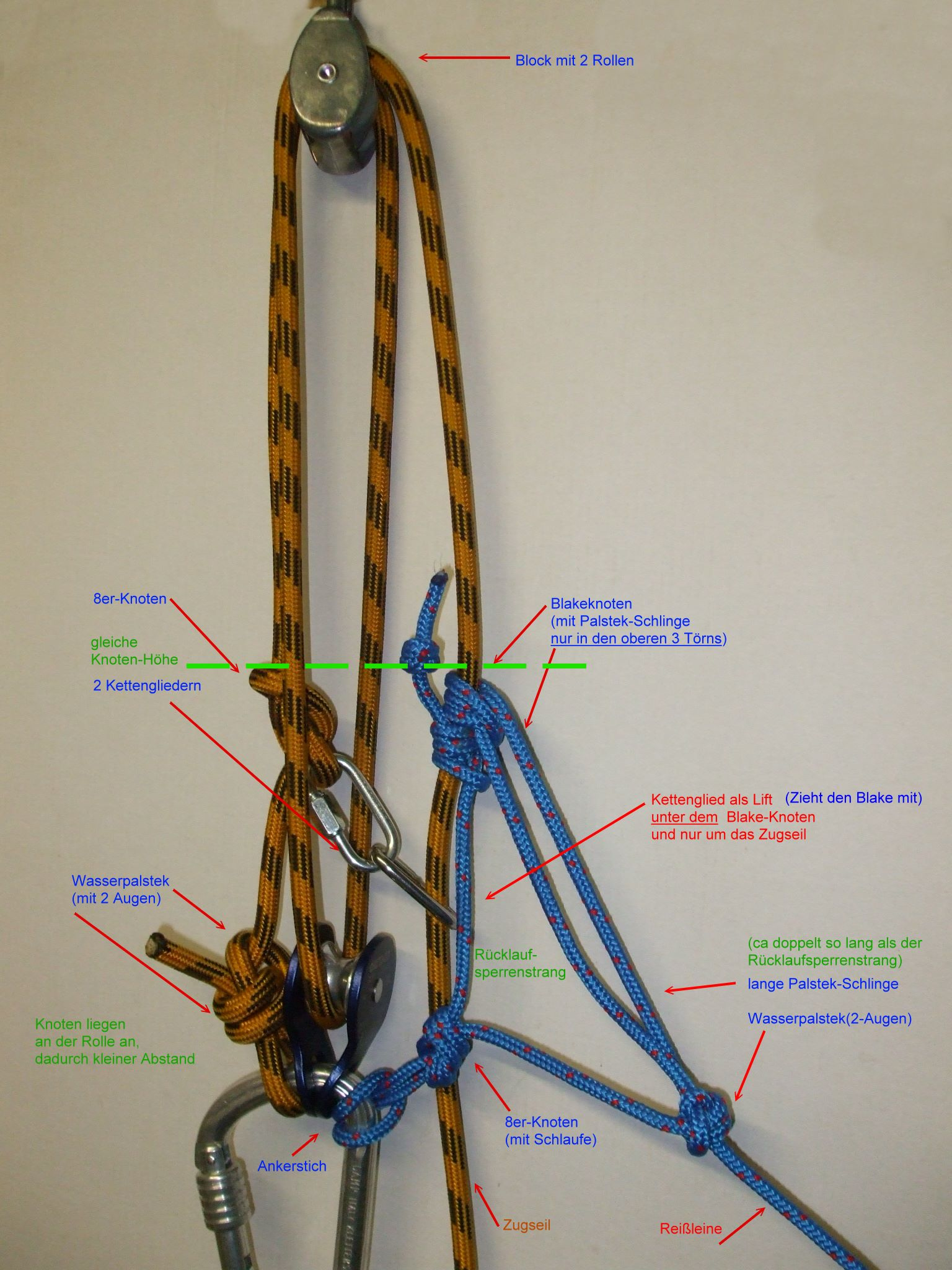 Rücklaufsperre mit automatischer Nachführung (hier bspw. mit 2 Kettengliedern, alternativ auch Prusikschlinge), sowie ferngesteuerte Lockerung durch "Reißleine" (aus Distanz, vom Boden etc.) mittels Reepschnur. Details im Bild beschriftet.